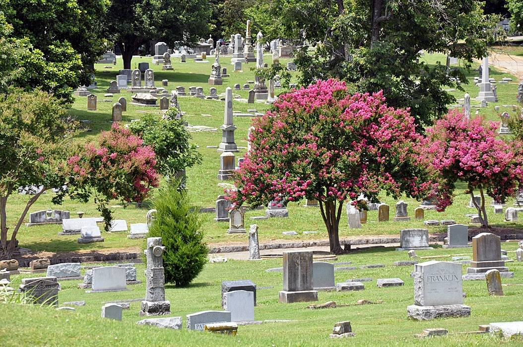 Elmwood Cemetery, Memphis